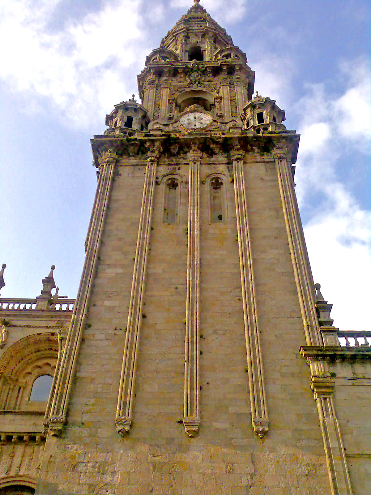 Torre da berenguela ou do reloxo - Domingo de Andrade - Catedral de Santiago de Compostela